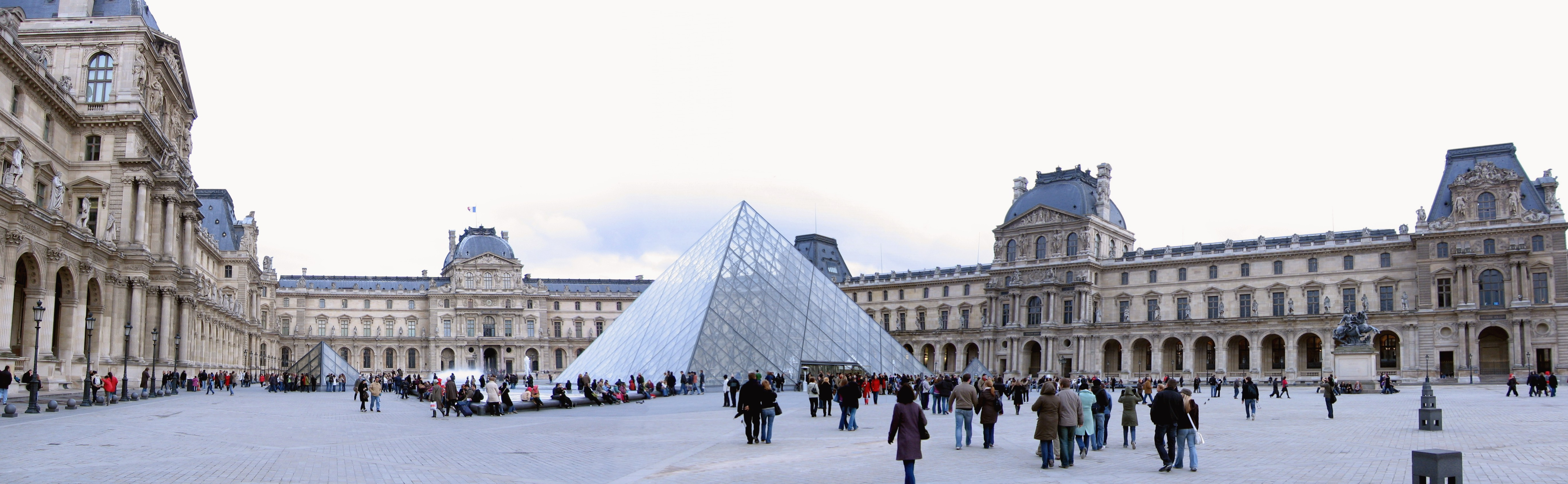 entrance of the Louvre Museum / Innenhof des Louvre